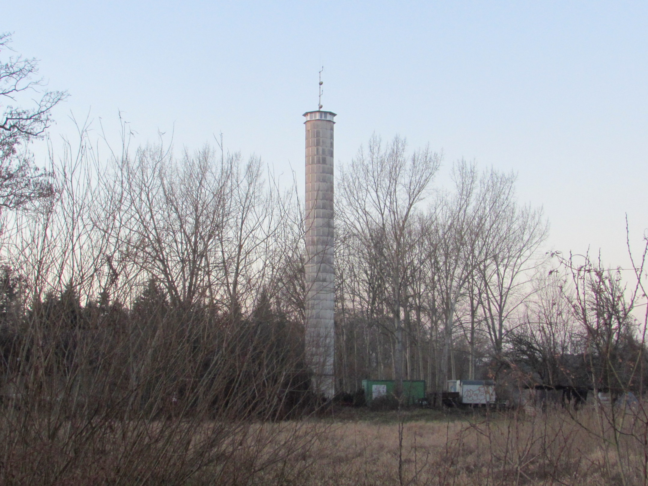 Feuerwachturm im Gördenwald bzw. im Altstädtischen Forst in Brandenburg an der Havel